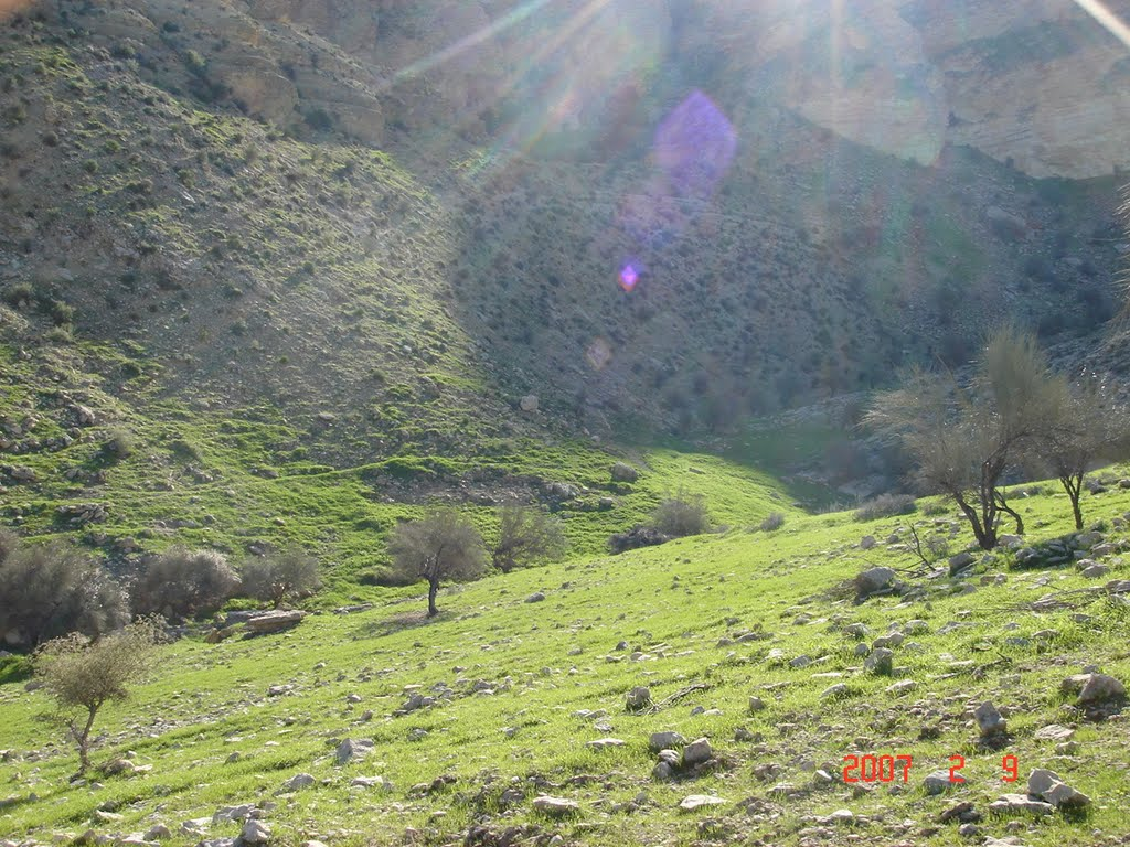 در مسیر کنارشی